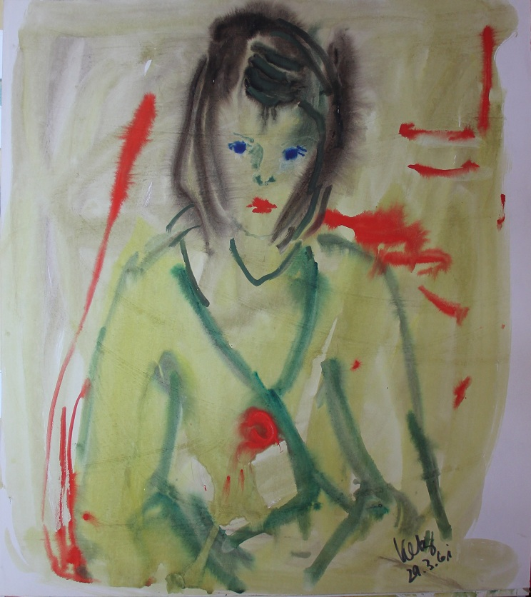 Aquarell